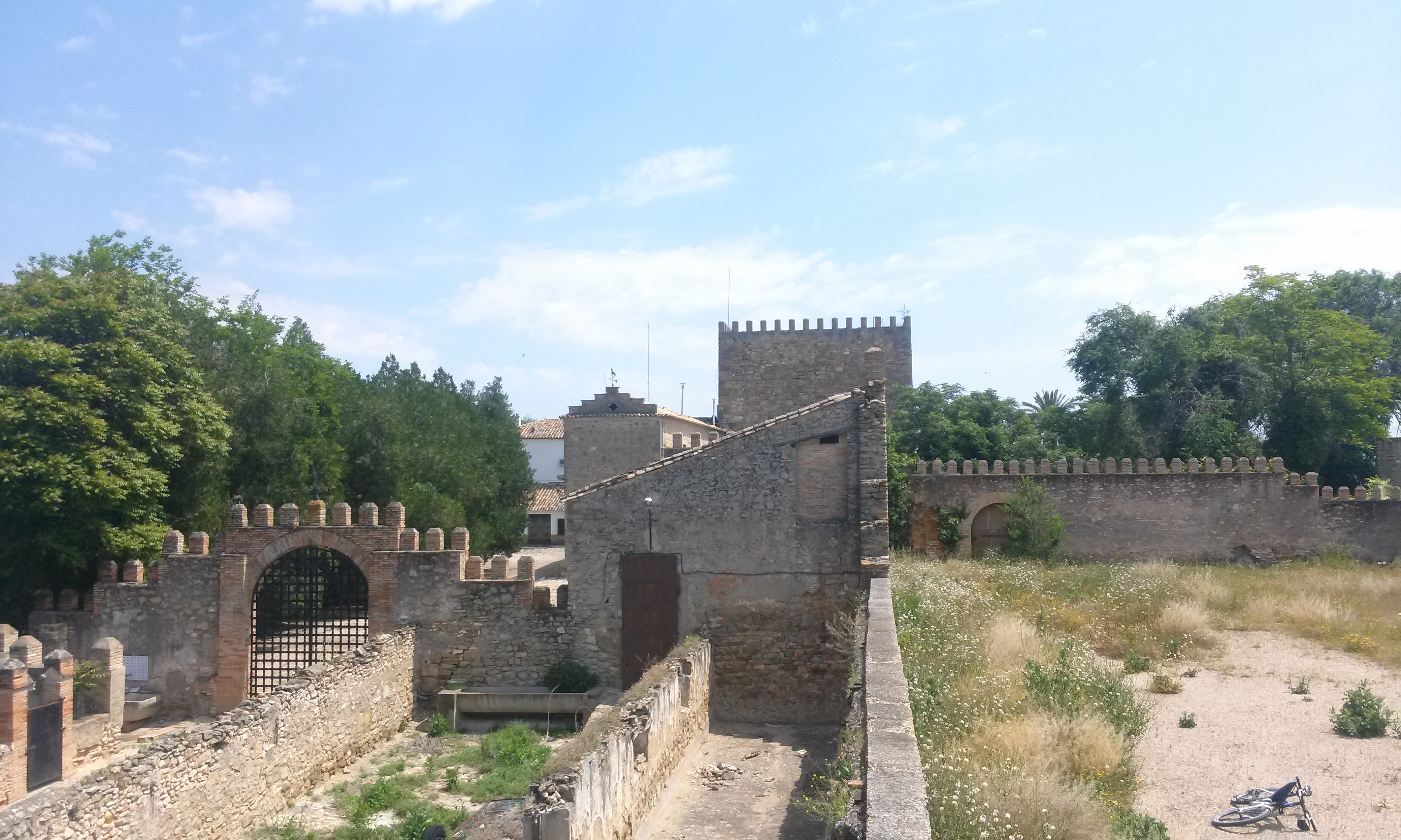 Vista general del castillo de Espelúy.